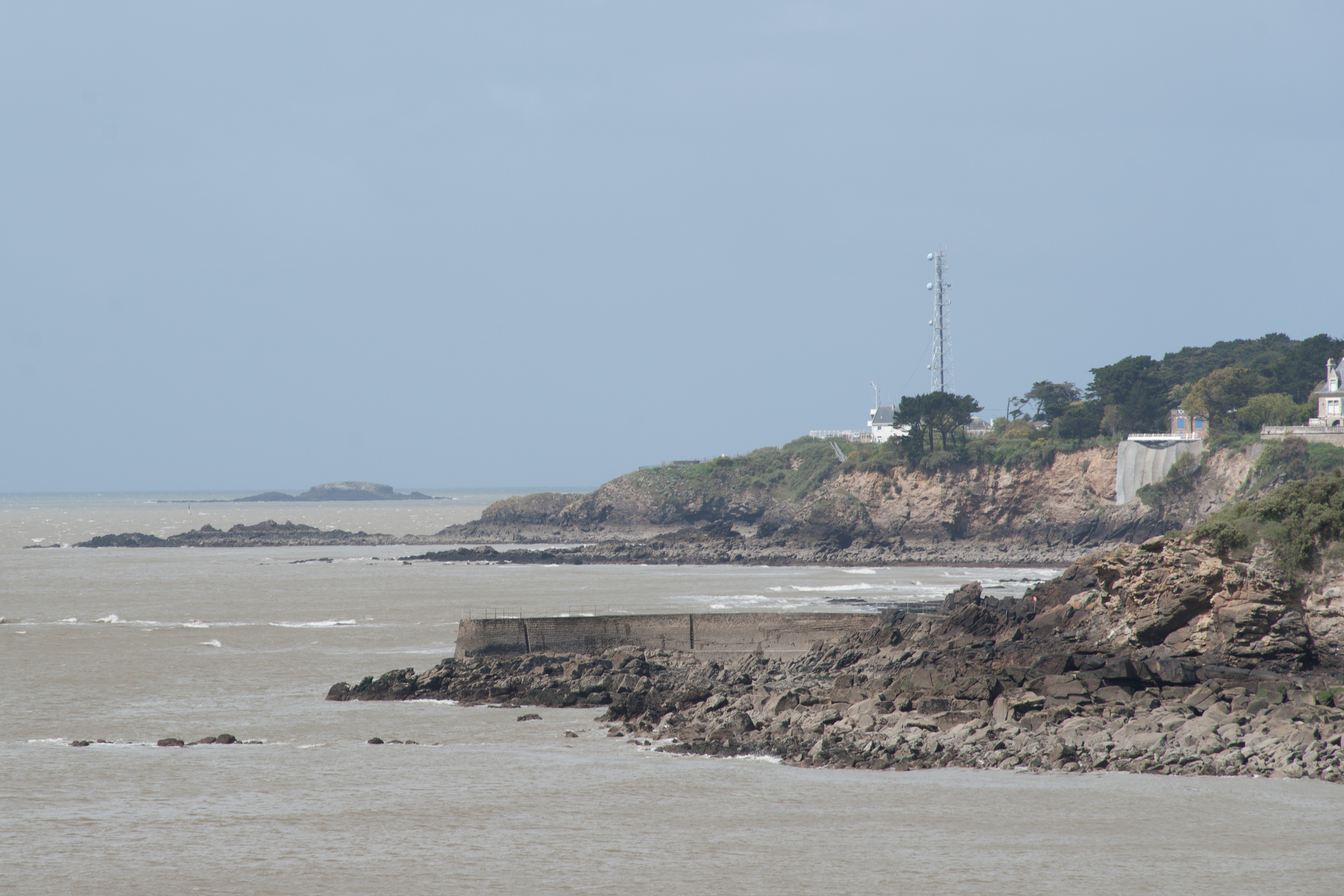 Pointe de Chemoulin depuis le Fort de l'Eve